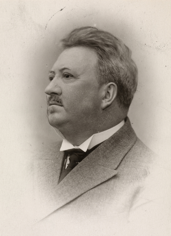 Ivar Næss, fotografert av ukjent fotograf, ca. 1925. Fra Byhistorisk samling hos Oslo Museum.